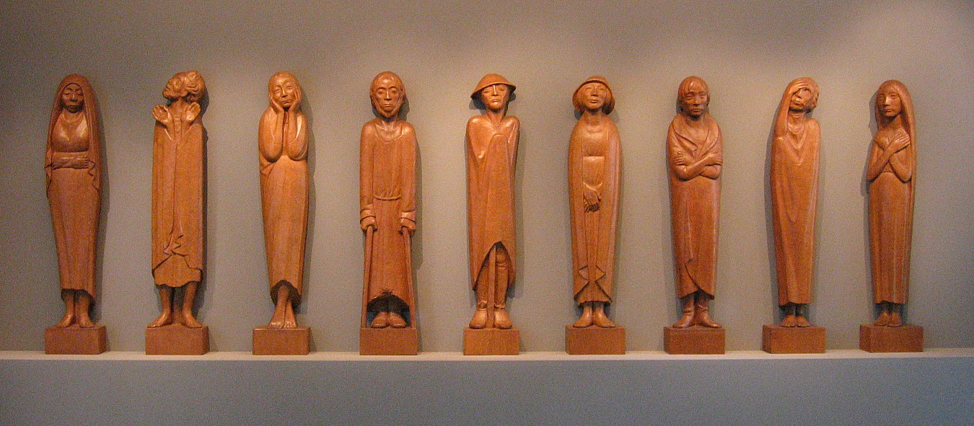 Der Fries der Lauschenden, 1930-35, Eichenholz, Ernst Barlach Haus, Hamburg